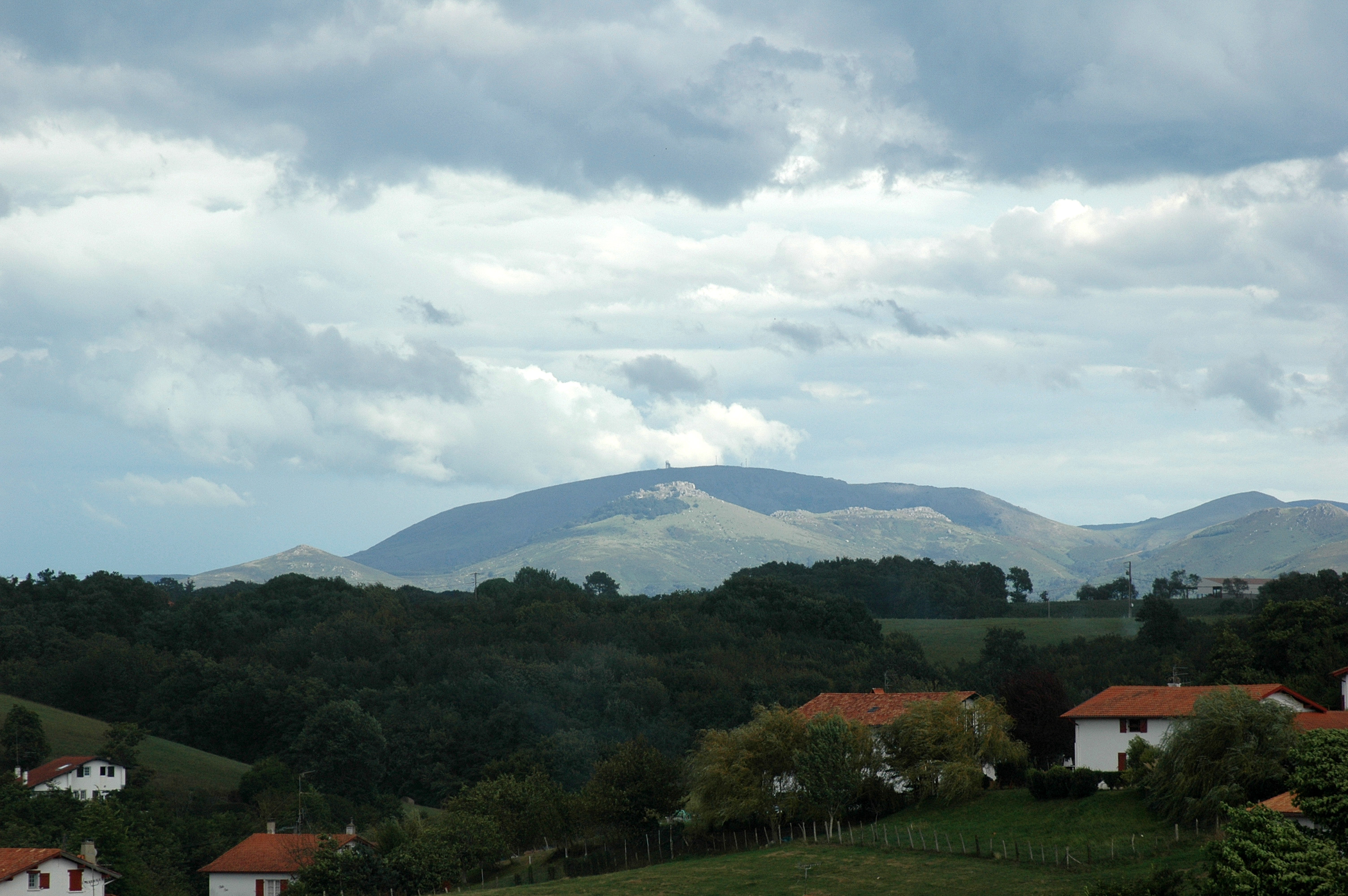 Ahetze, Mondarrain et Artzamendi. Photo prise le 17/08/06 par Harrieta171